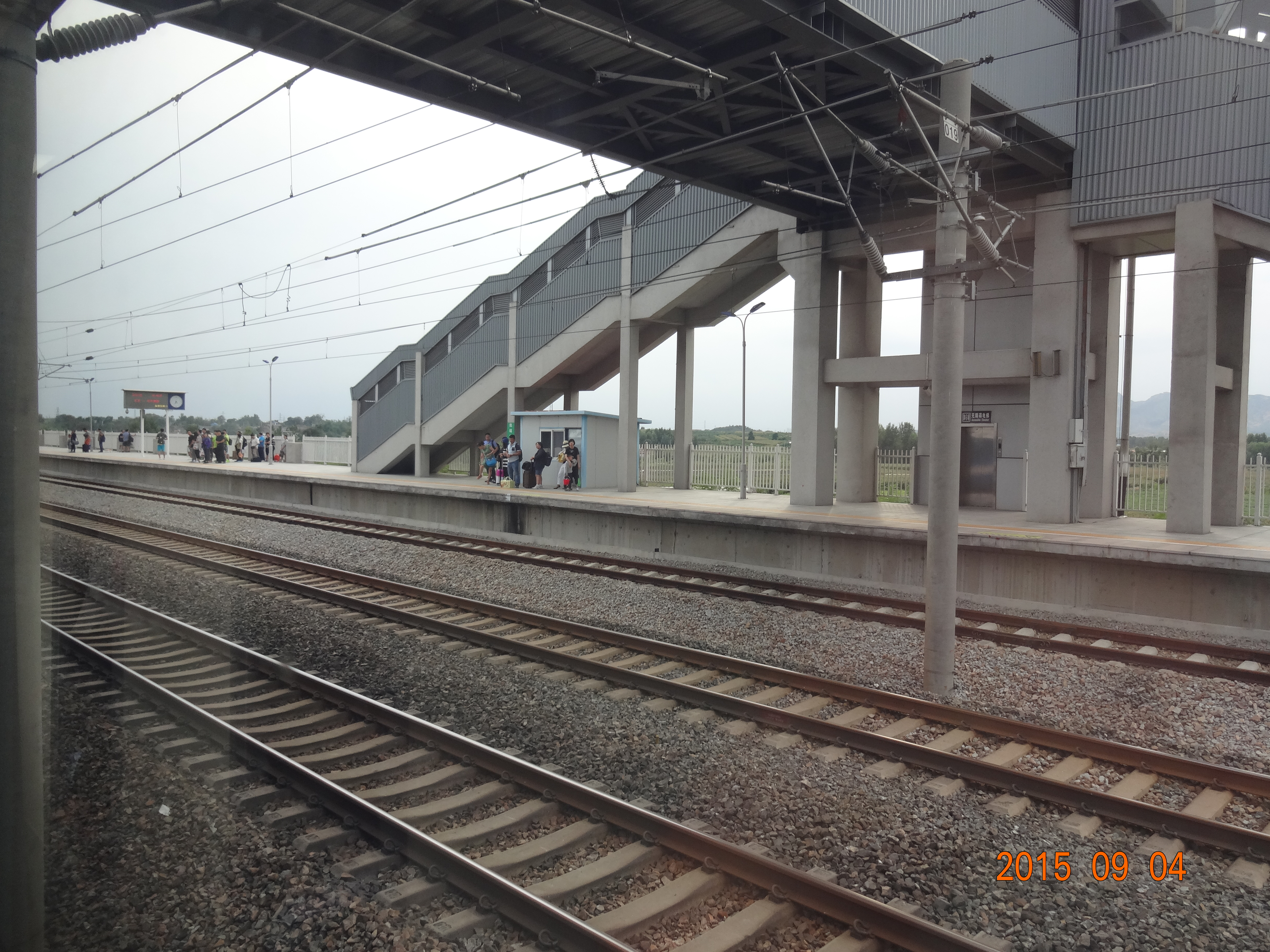 东戴河站